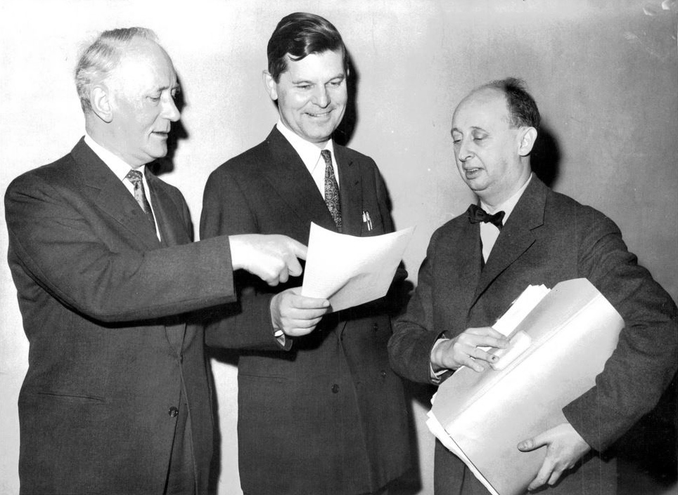 Direktör Einar Nilsson, borgarråden Erik Huss och Hjalmar Mehr underöverläggningarna om Stockholms skatt.